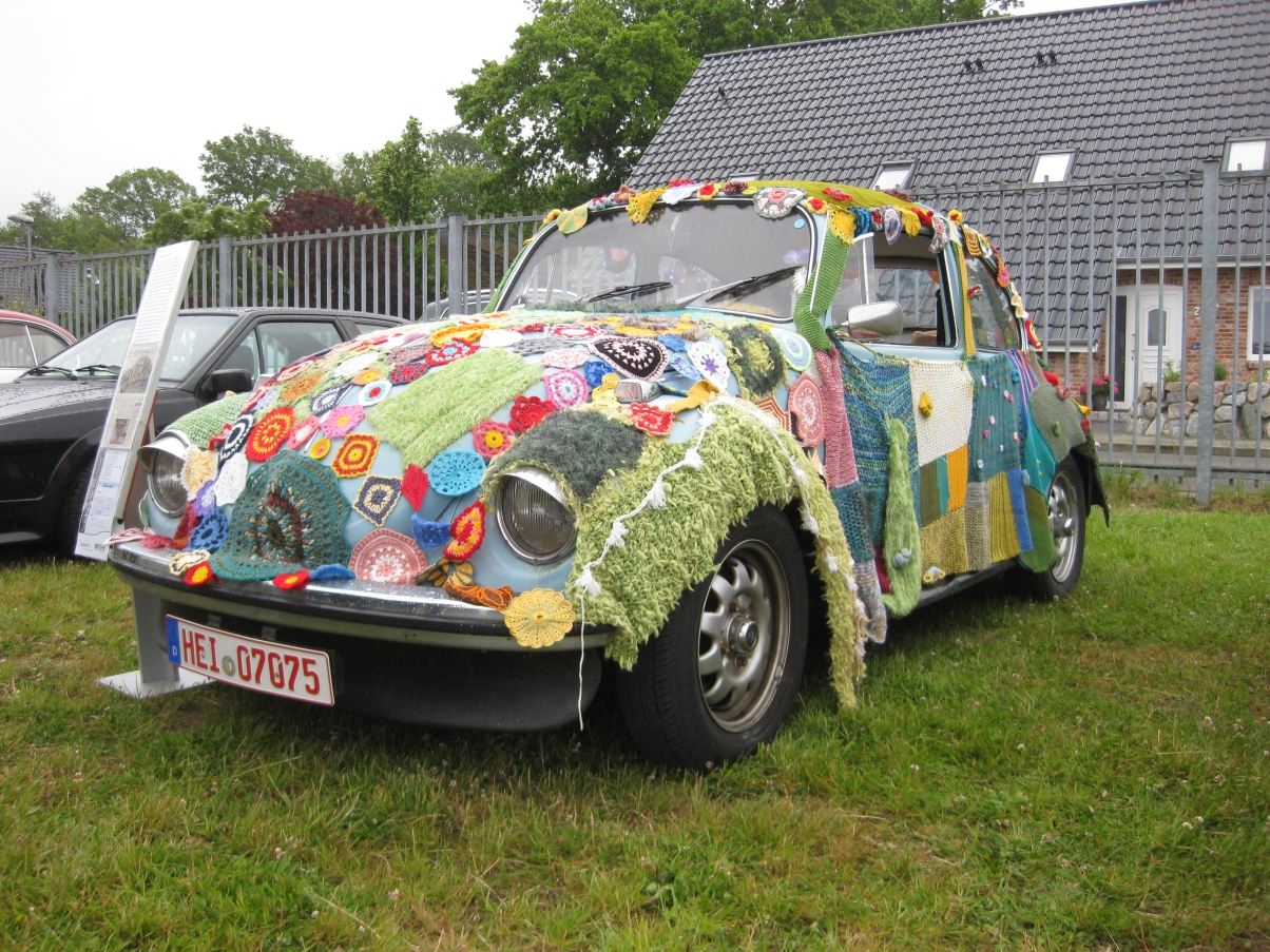 VW Käfer "gestrickt" im Flowerpower-Look